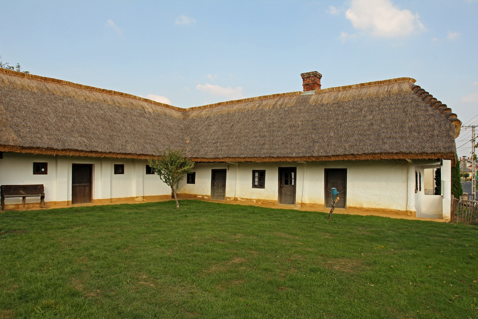 Lakóház, népi (Zalalövő, Petőfi Sándor utca 35-37.) This is a photo of a monument in Hungary, Identifier: 11089